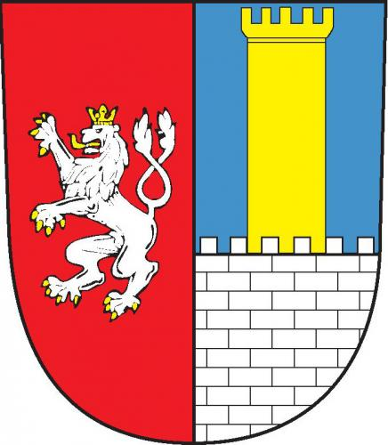 znak obce Český Rudolec